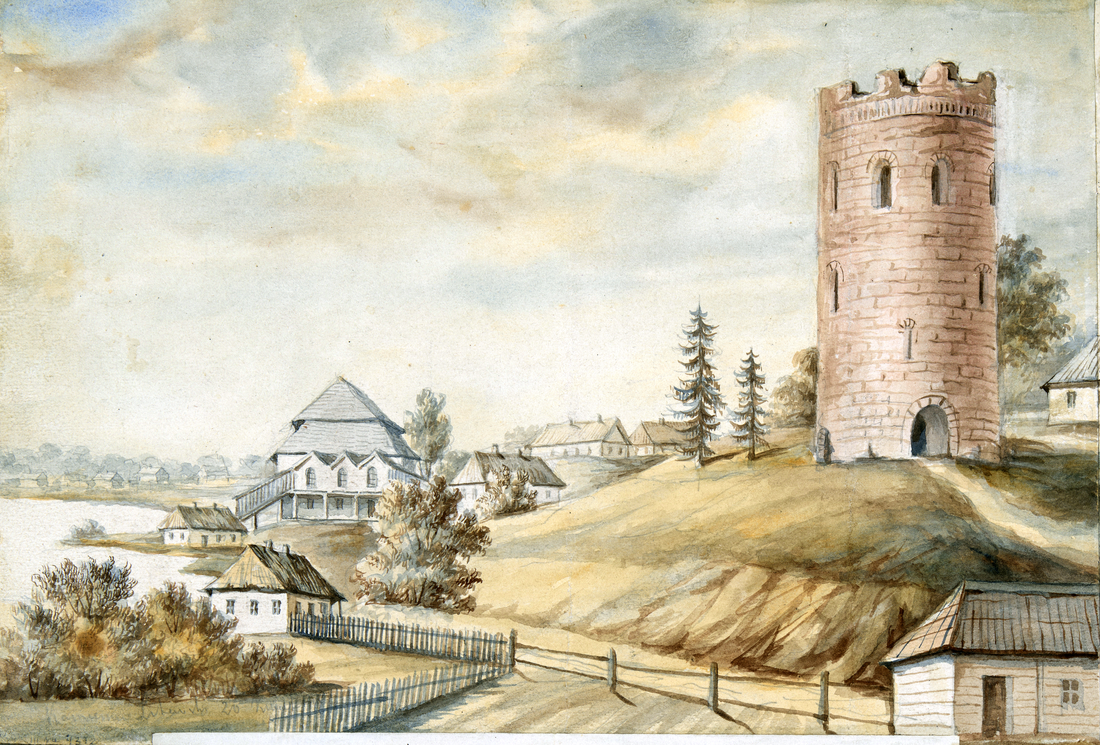 Беларуская (тарашкевіца): Камянец (Kamieniec), вуліца Падрэчная (vulica Padrečnaja). Вежа і сынагога